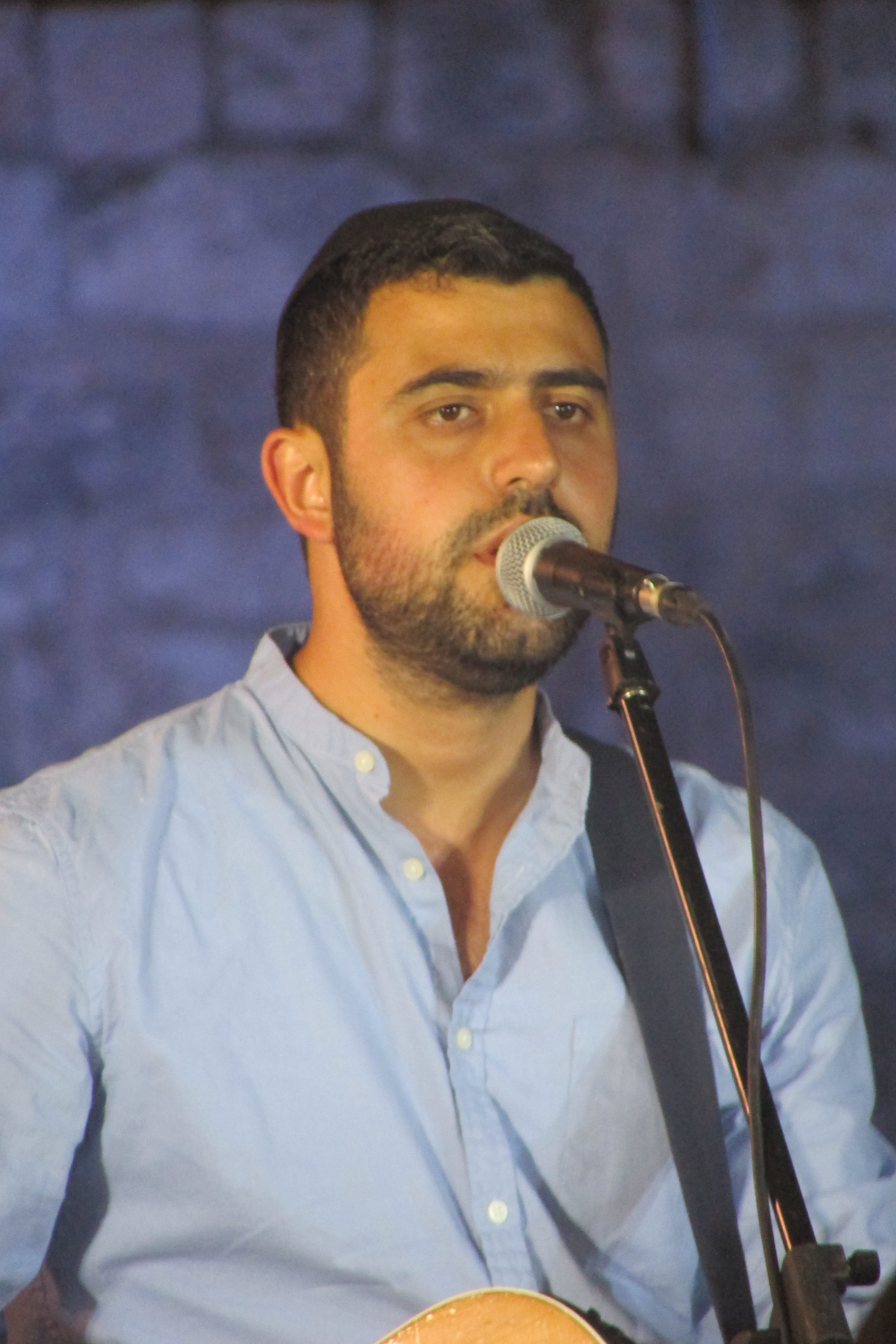 Yishai Rivo